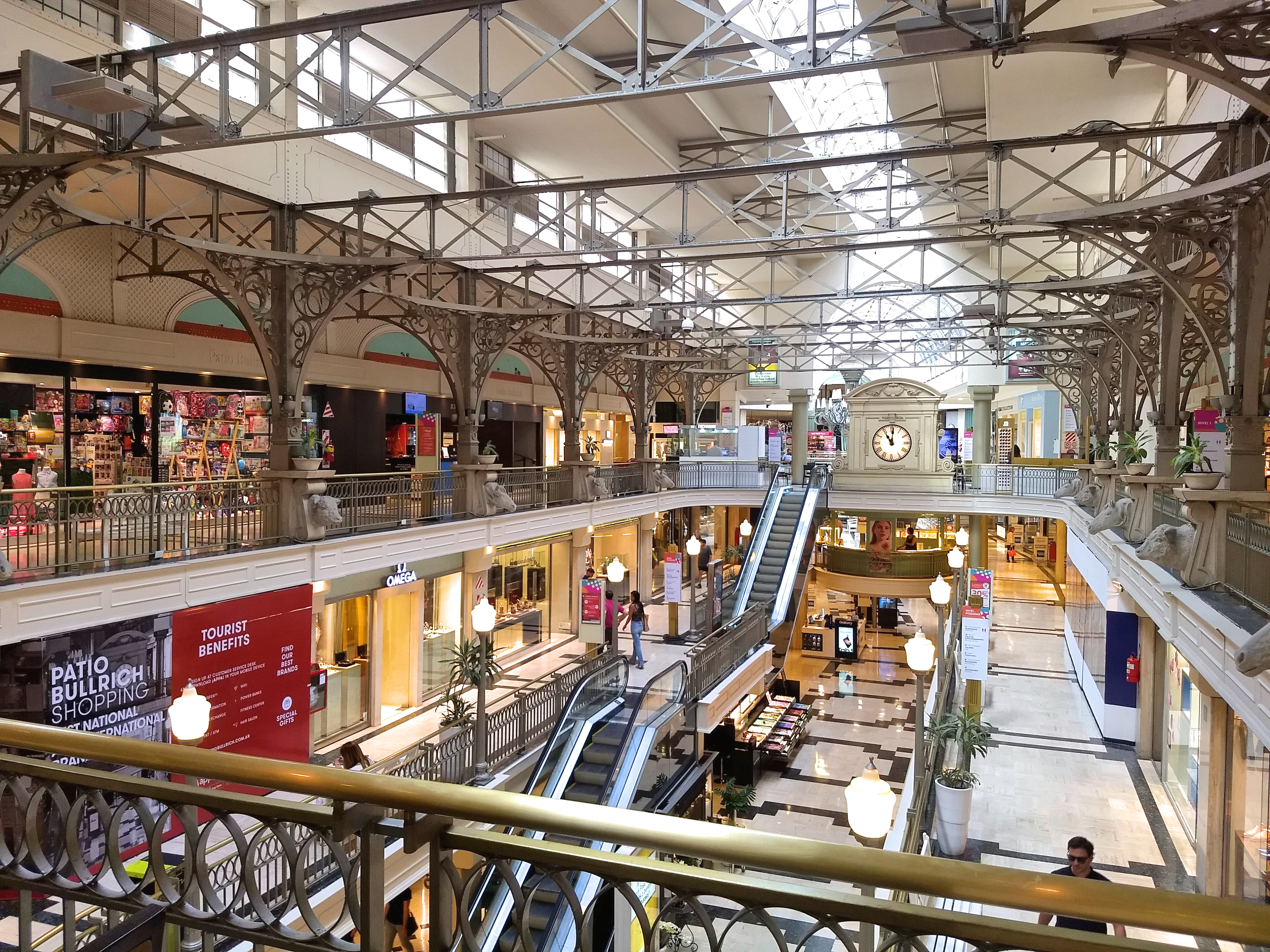 Vista del centro comercial desde el primer piso, con vista al piso 0 (Posadas) y Entre Pisos (Libertador)